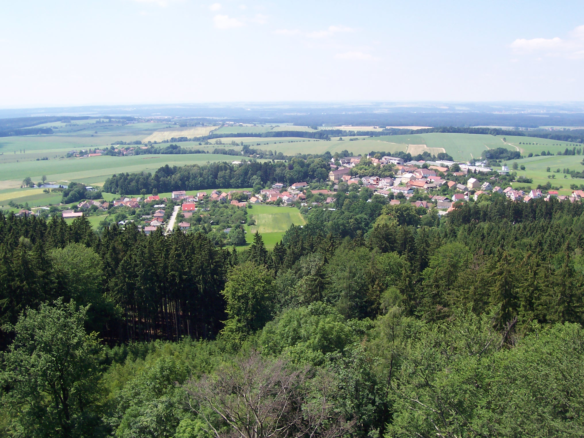 Vesnice Choustník, pohled z hradu Choustník / Village Choustník, view from castle Choustník